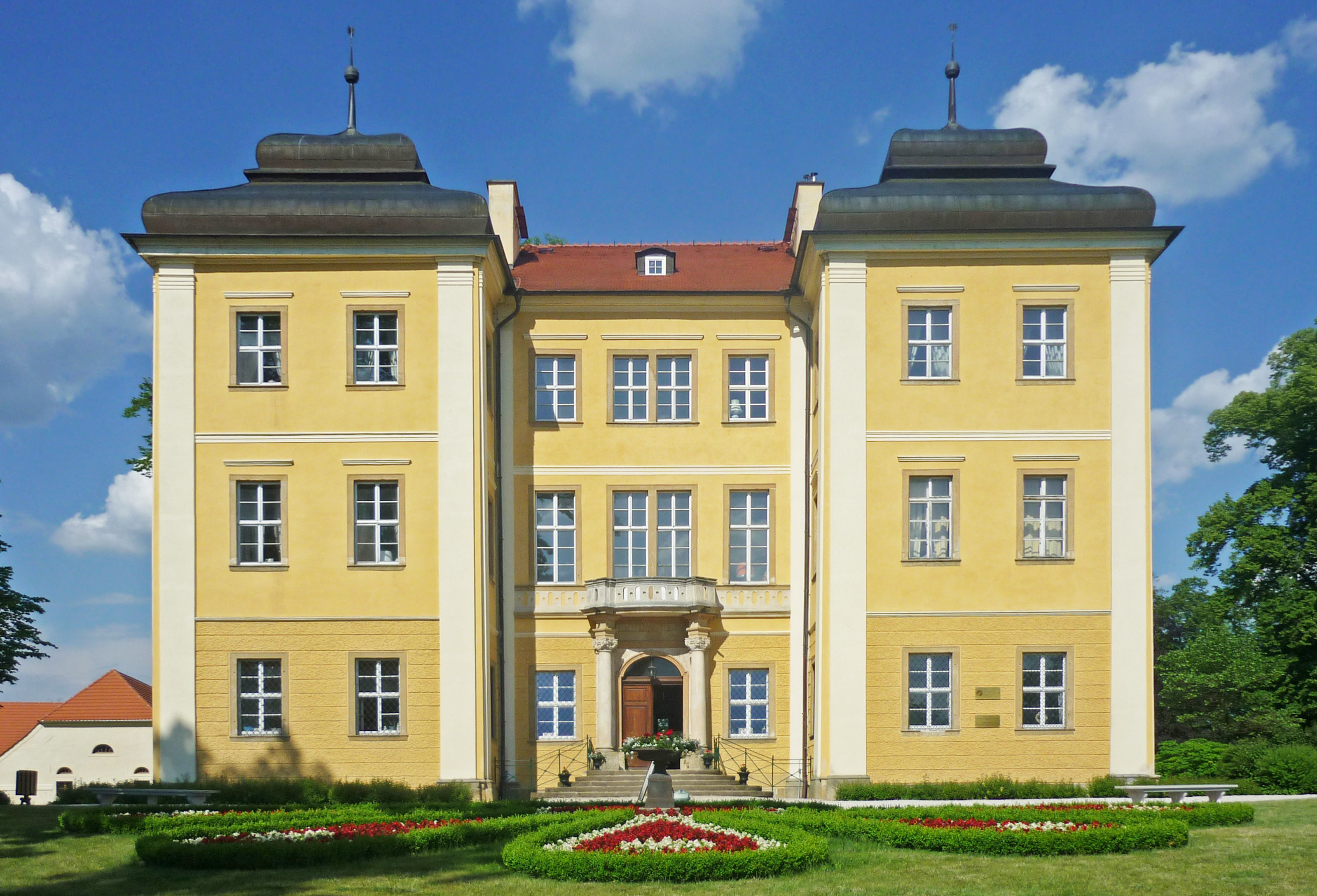 Schloss Lomnitz im Riesengebirge